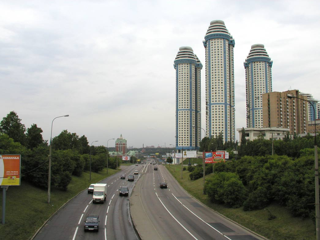 Жилой комплекс «Воробьёвы горы»